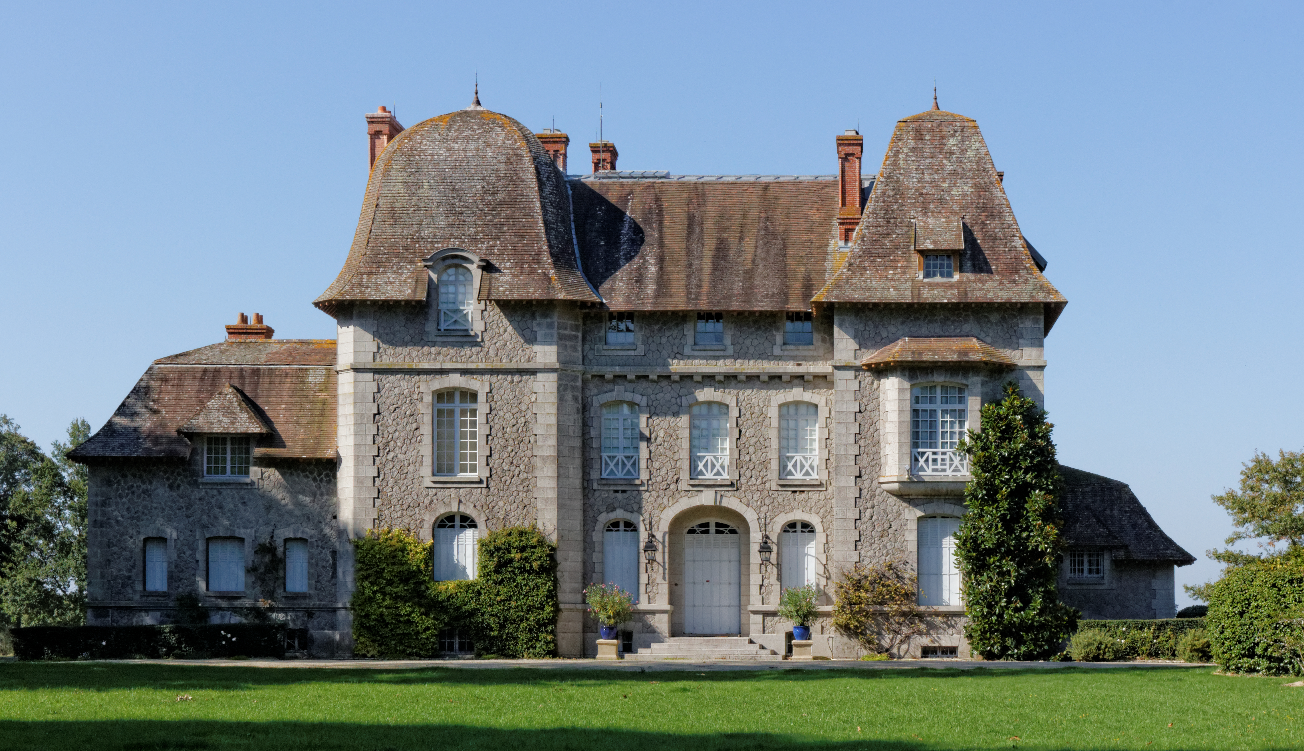 Château de Bois-Rouaud, lors de l'OPL Chéméré